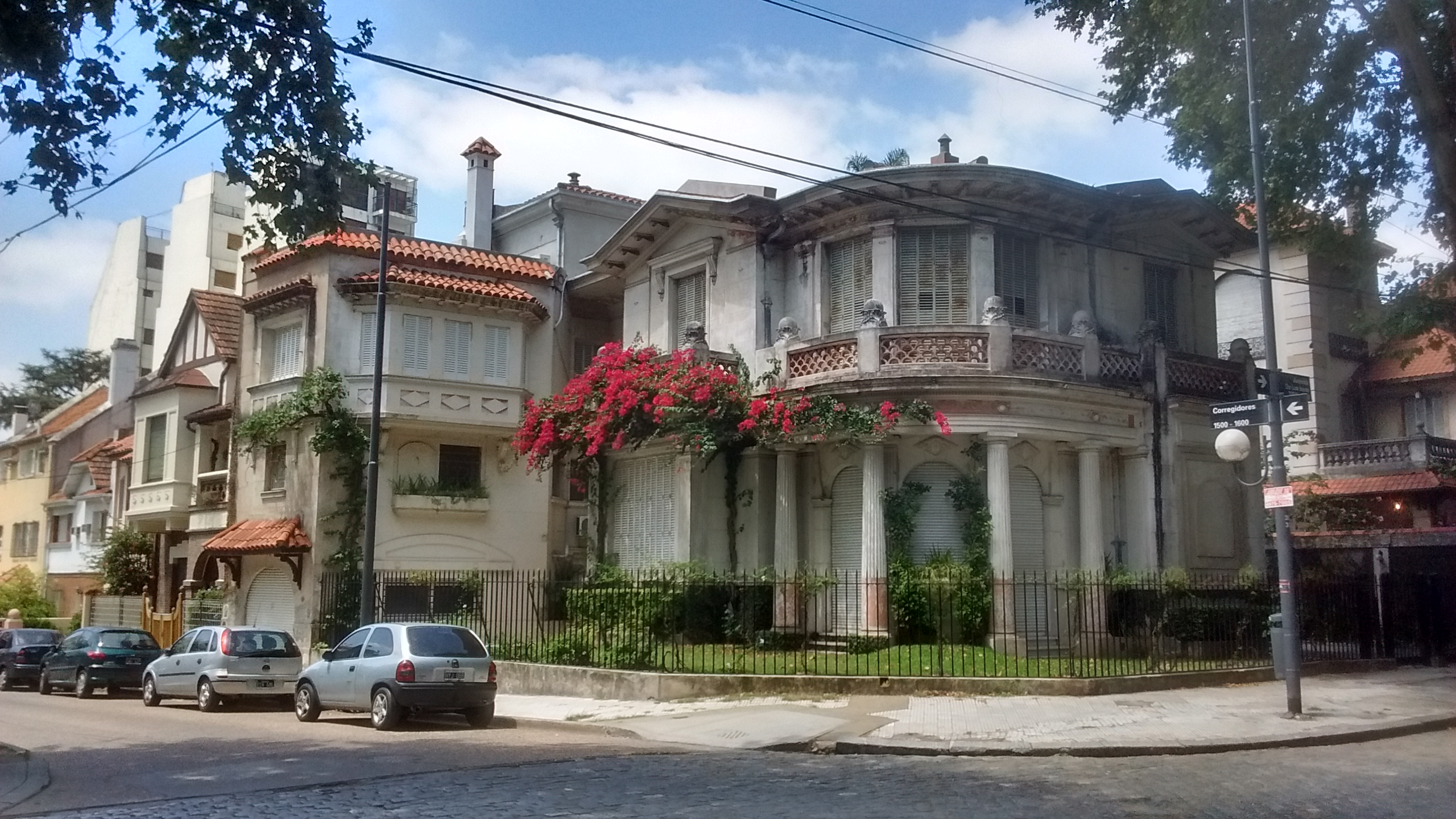 Casa en Avenida de los Incas y Corregidores, Barrio de Colegiales, Buenos Aires, Argentina.